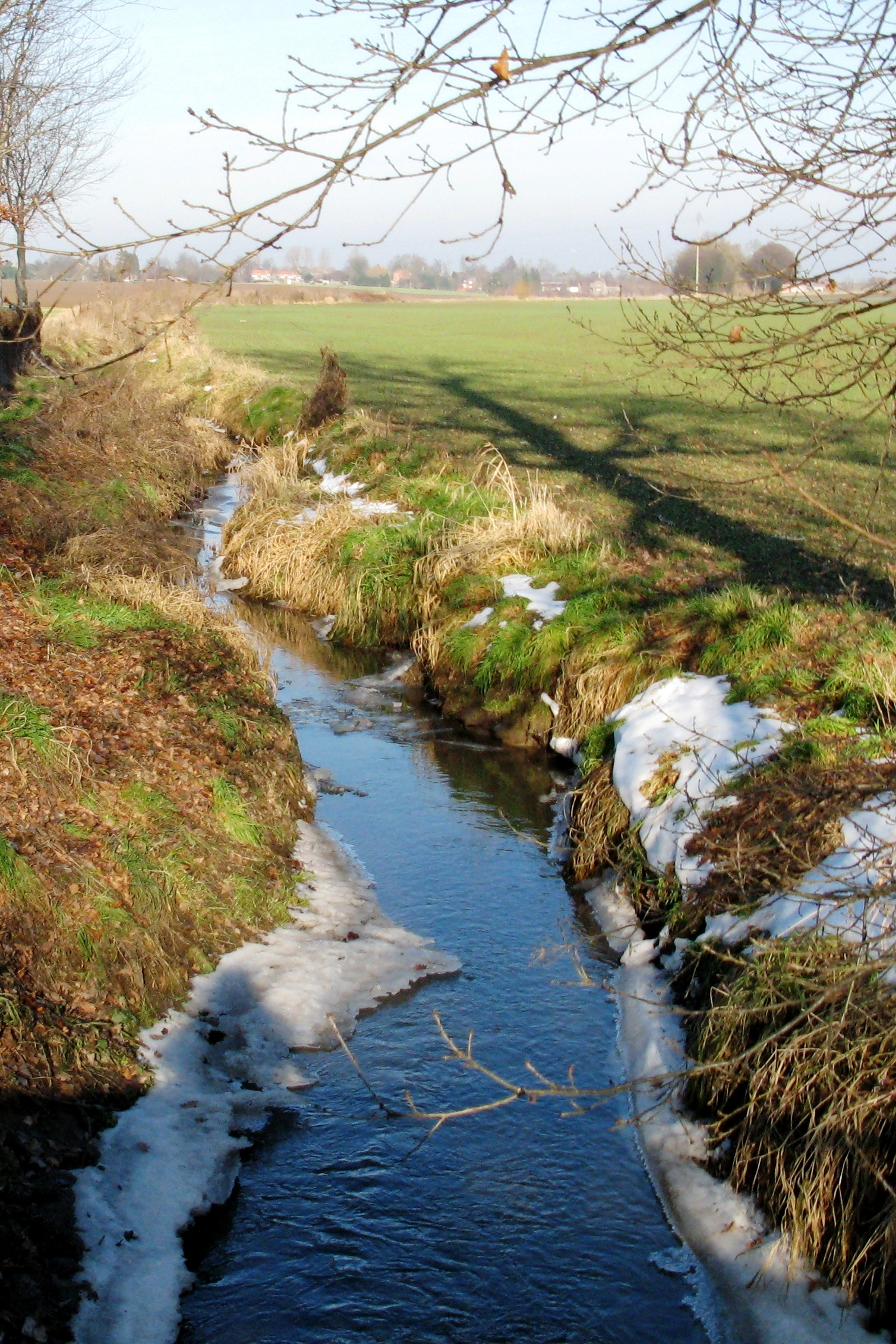 D'Yerne op der Héicht vum Château de Limont. Yerne